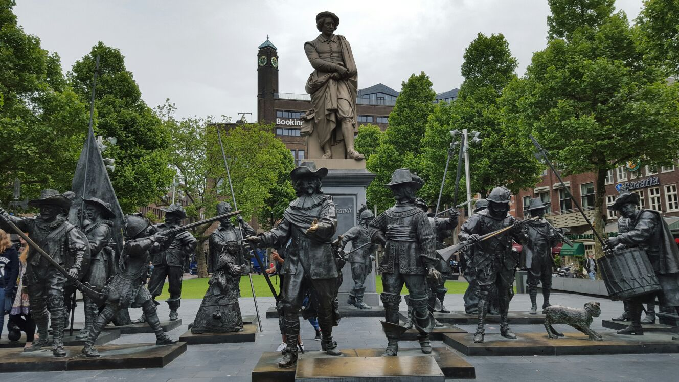 esculturas de la plaza de Rembrandtplein en Amsterdam